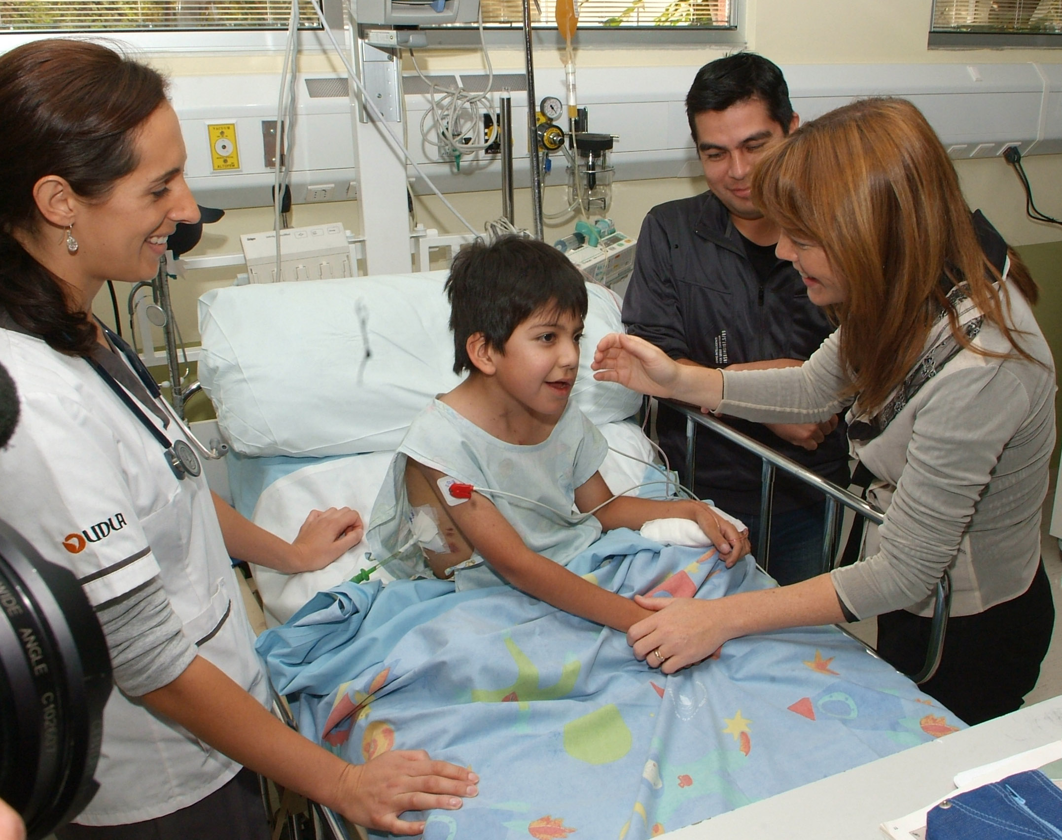 Ministra Secretaria General de Gobierno, Ena von Baer, asiste a inauguración de nuevo edificio del Hospital Luis Calvo Mackenna.